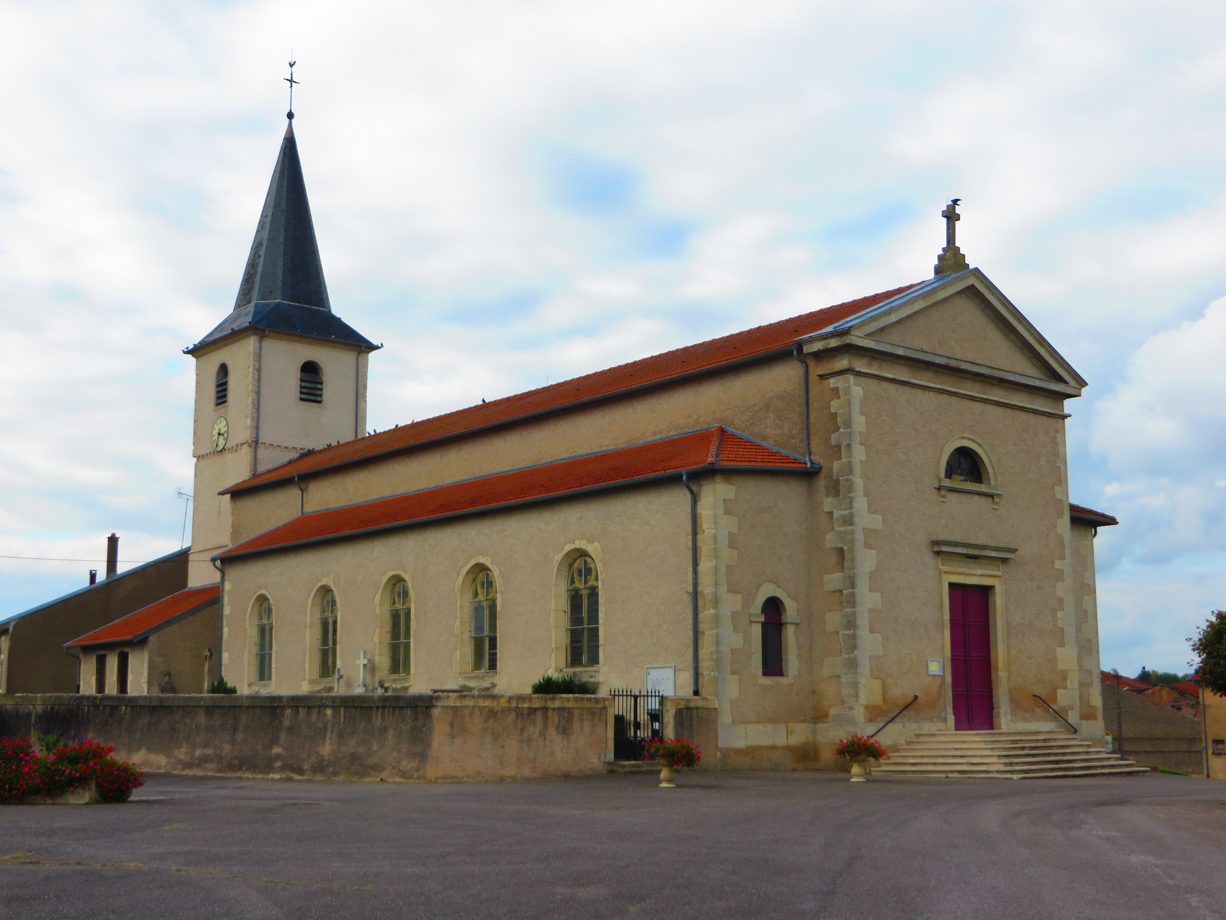 Fonteny Église Saint-Lambert